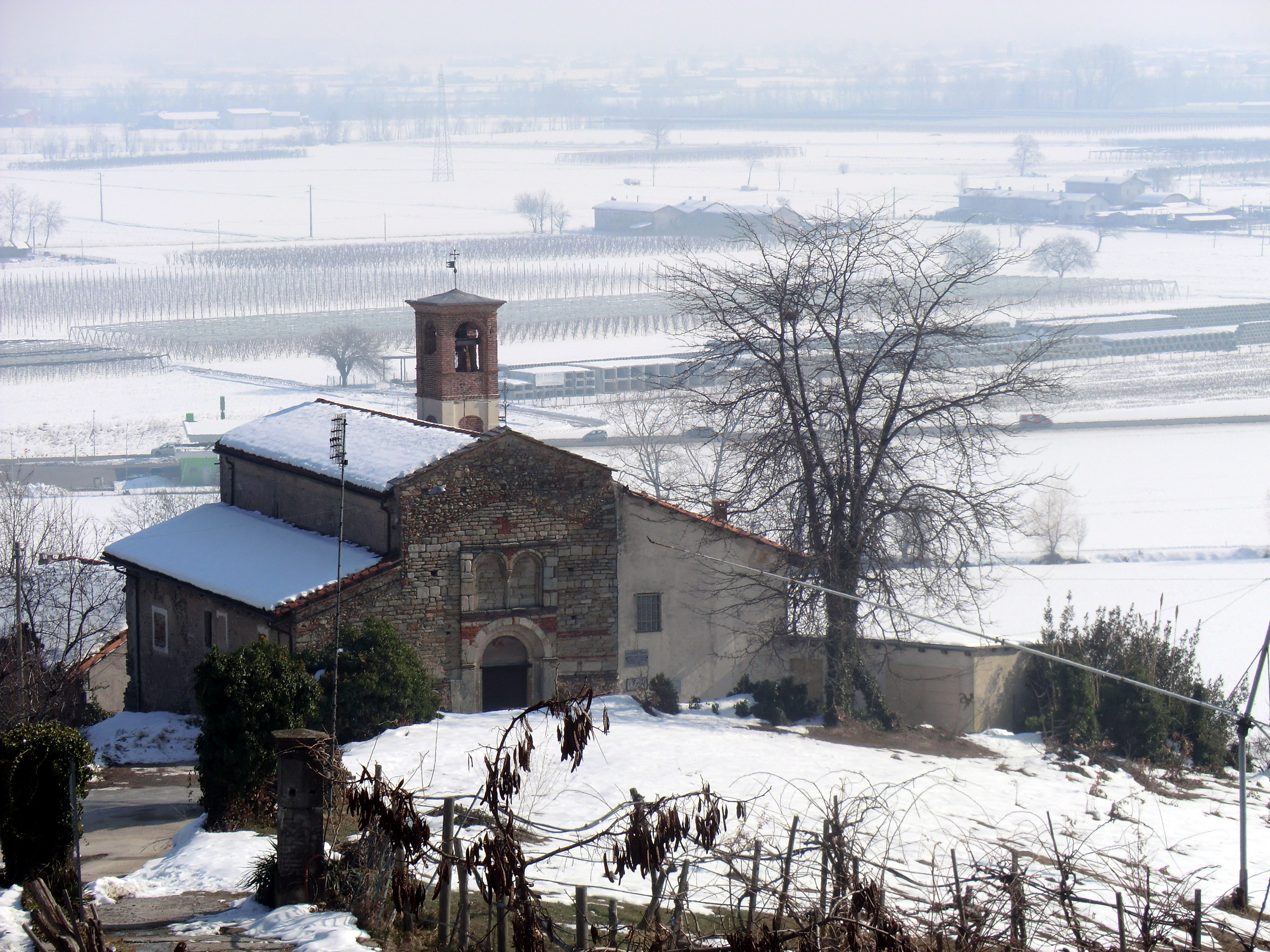 Busca (Cuneo): Chiesa di San Martino (X sec.)